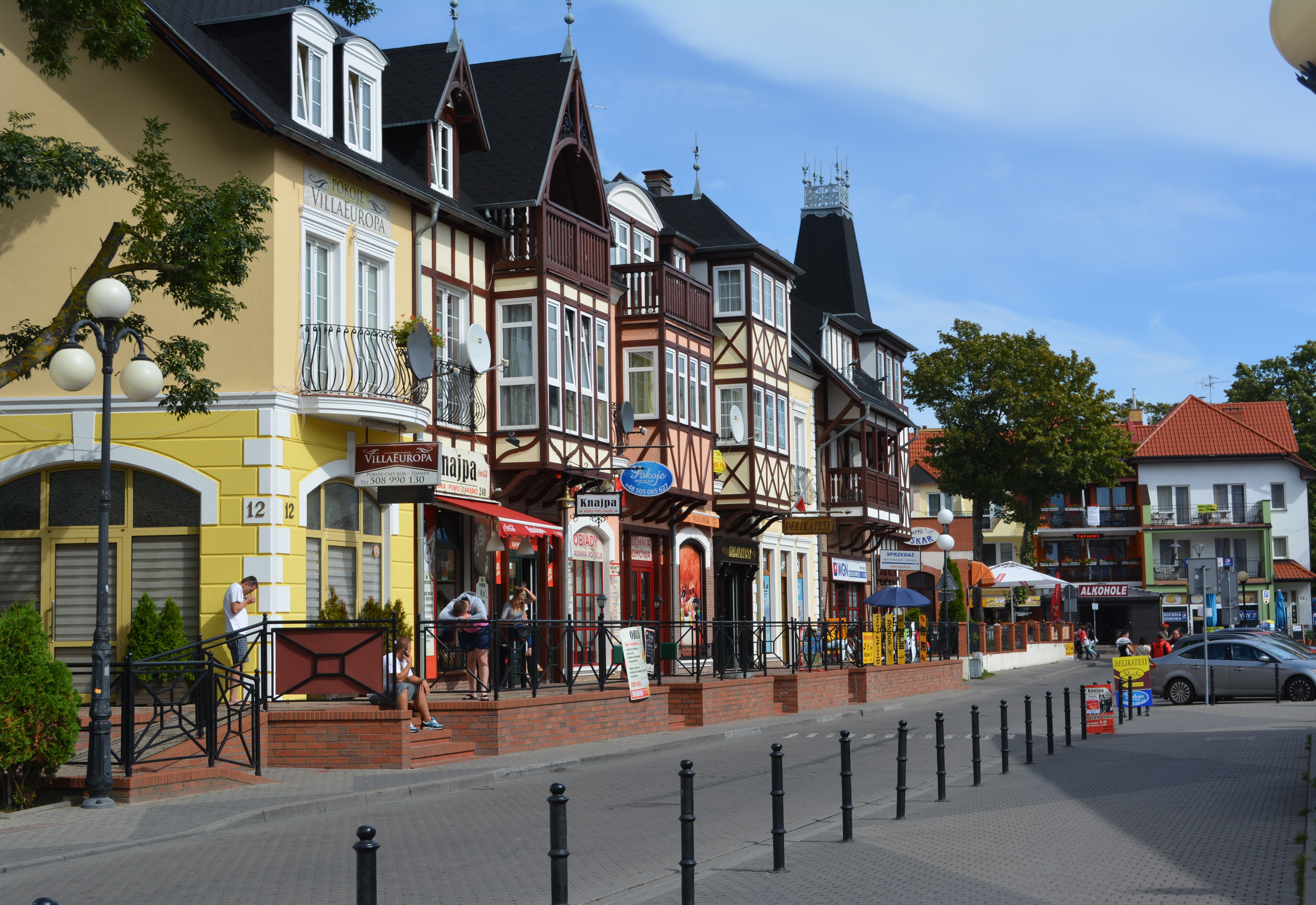 Ansicht der Nadbrzezna-Straße im alten Ortskern von Mielno, Kreis Koszalin